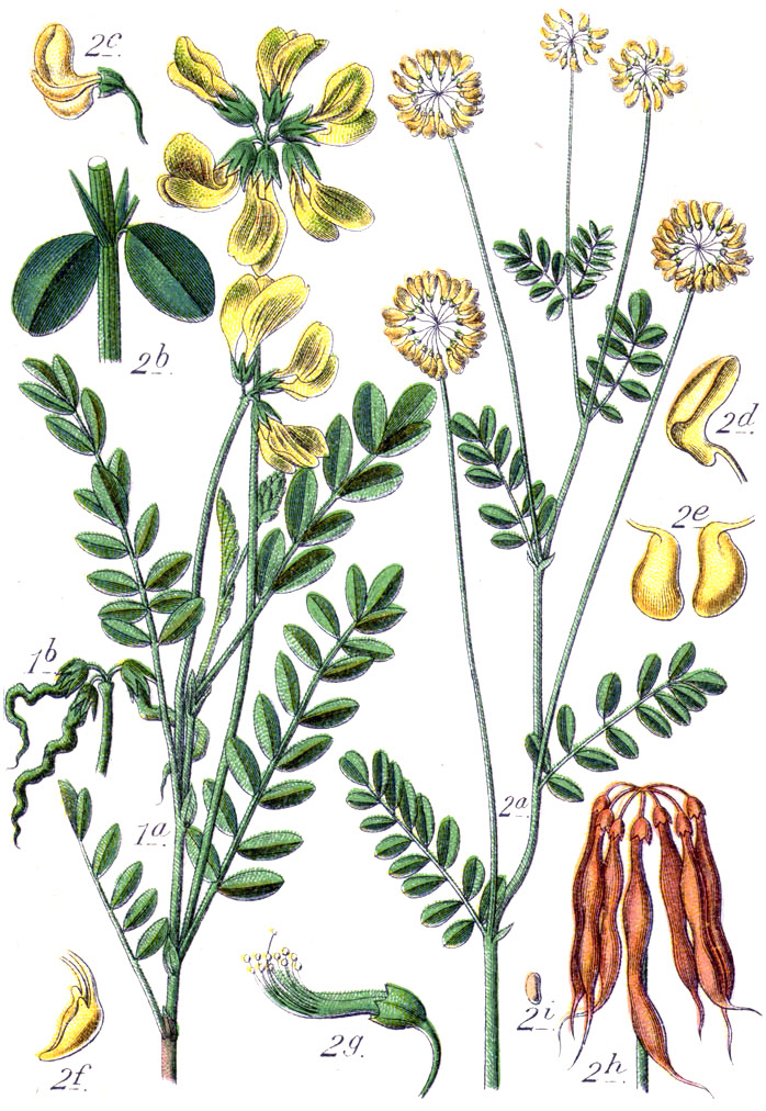 1. FloraWeb.de: Hufeisenklee, Hippocrepis comosa L. Unresolved name: Coronilla comosa (L.) Prantl 2. Coronilla coronata L., syn. Coronilla montana Jacq. Original Caption 1. Hufeisenklee, Coronilla comosa 2. Berg-Kronwicke, C. montana